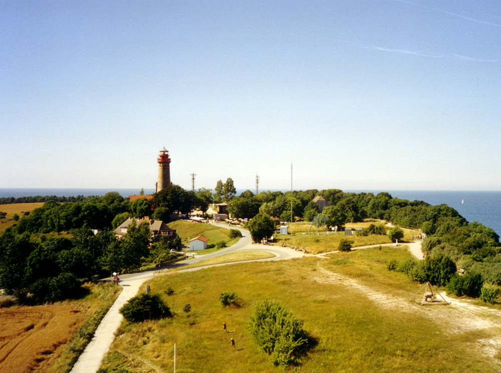 Autor: Darkone Beschreibung: Kap Arkona mit den 2 Leuchttürmen